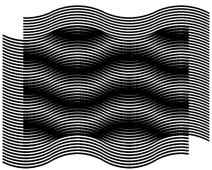 Line Moire - Figure 10. Inversed base layer and moiré lines